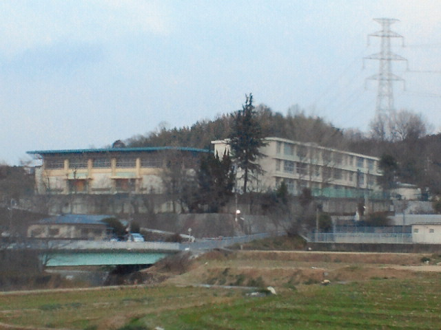 遠景（府道甘南備川向線より）